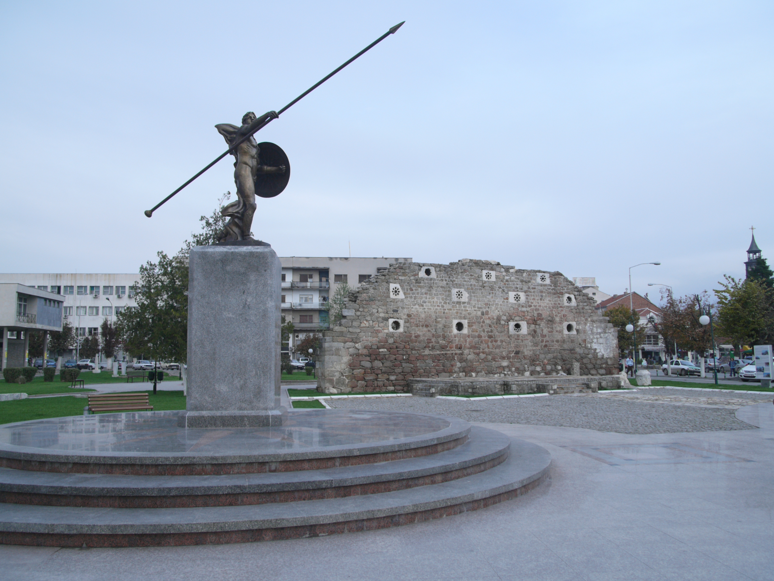 Kip Aleksandra Velikega v Prilepu